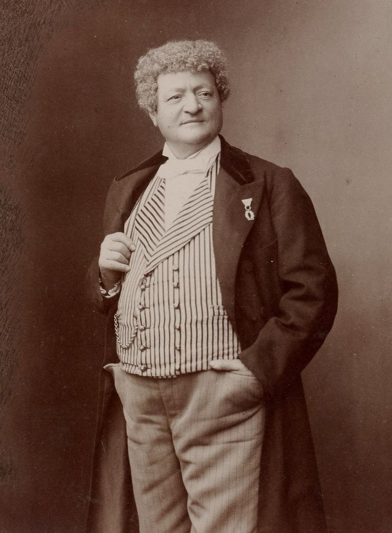 Montrouge (acteur), photographie, tirage de démonstration, Atelier Nadar